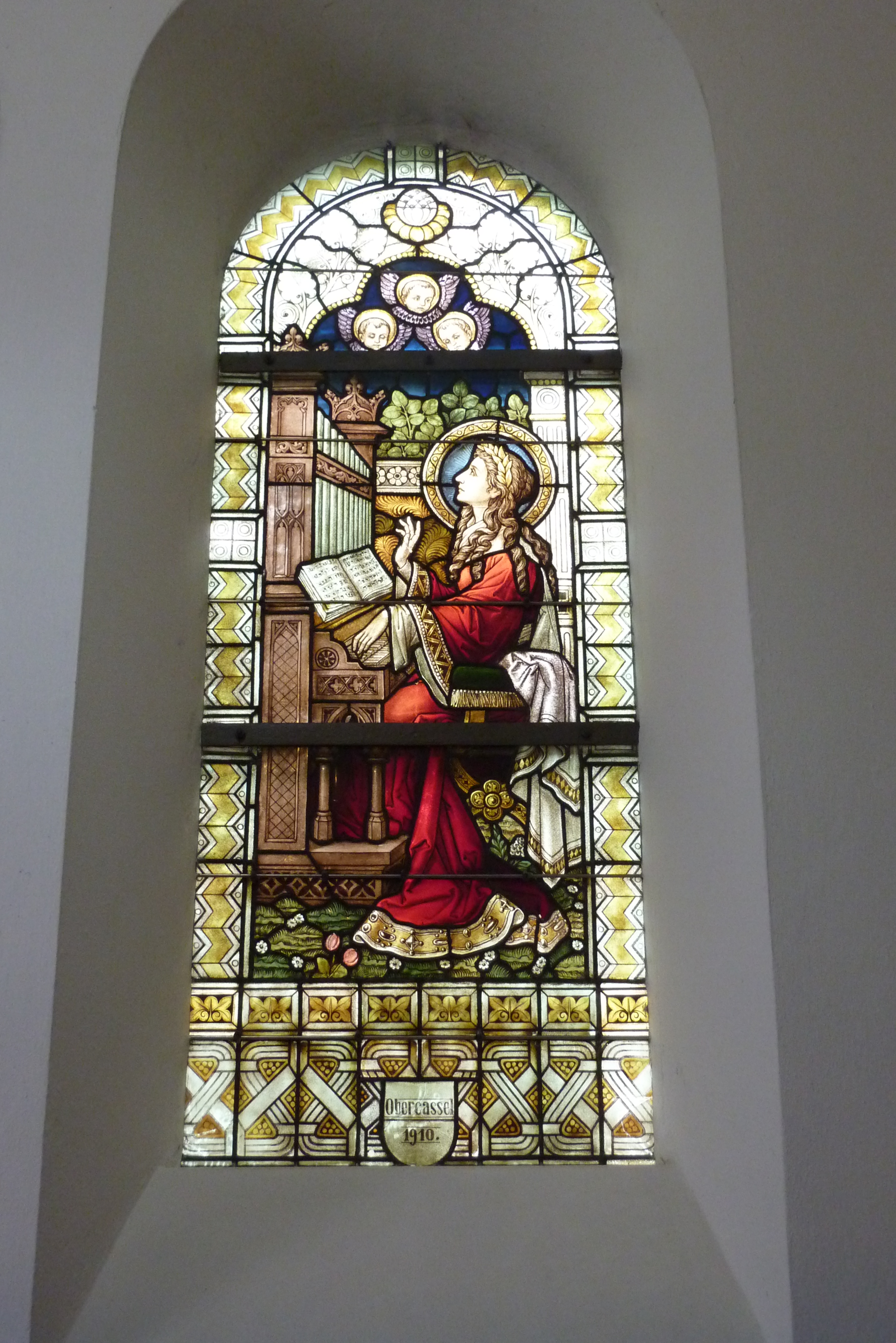 St. Cäcilia in Oberkassel, Bleiglasfenster mit der Darstellung der hl. Cäcilia, Inschrift: Obercassel 1910